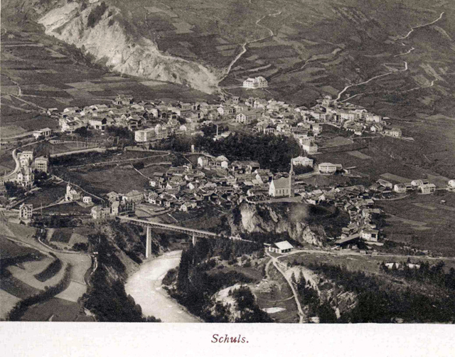 historisches Foto von Scuol (Kanton Graubünden)